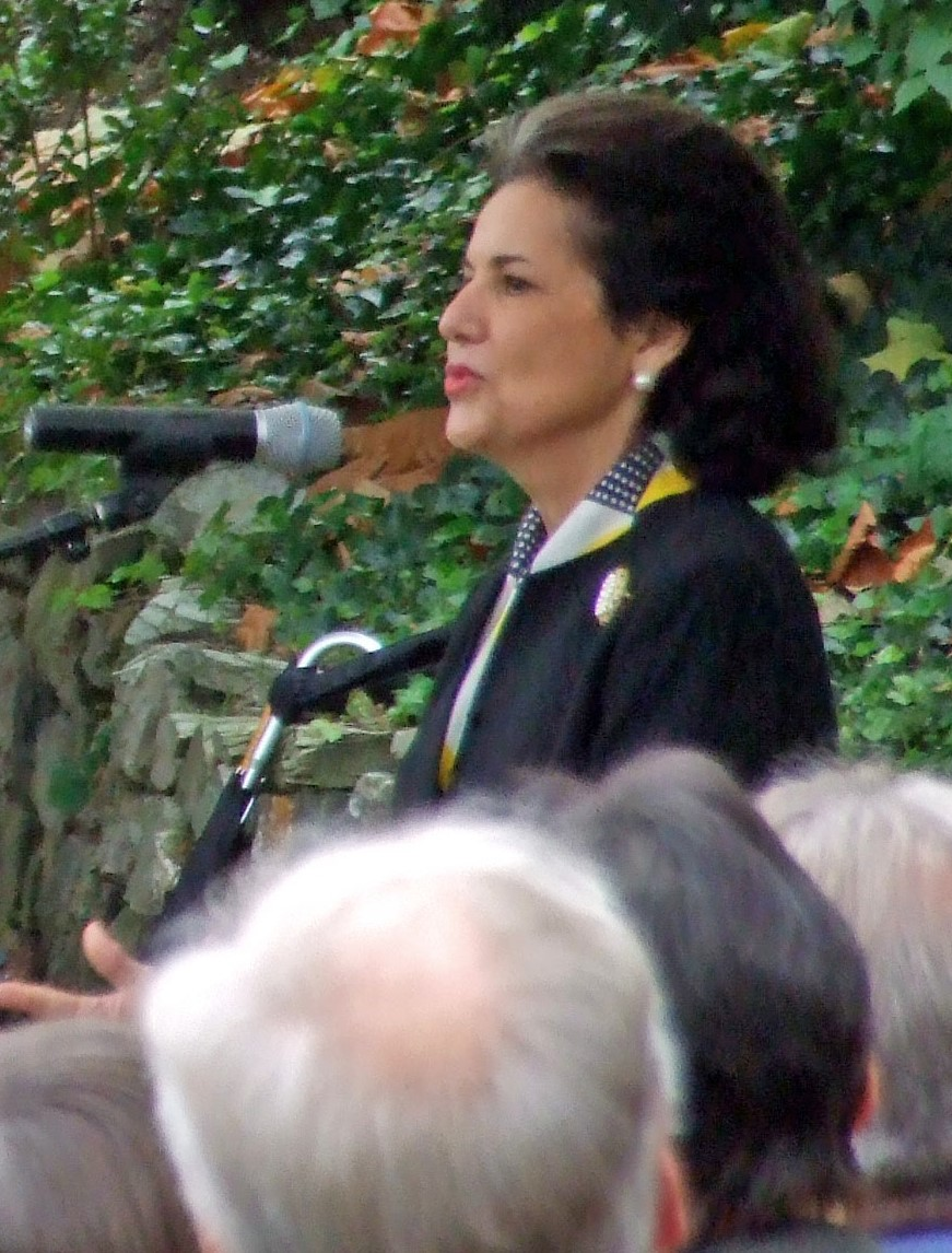 Marta Casals Istomin vor der Rostropowitsch-Denkmal-Enthüllung in Kronberg